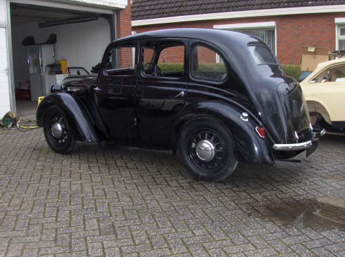 Austin A8